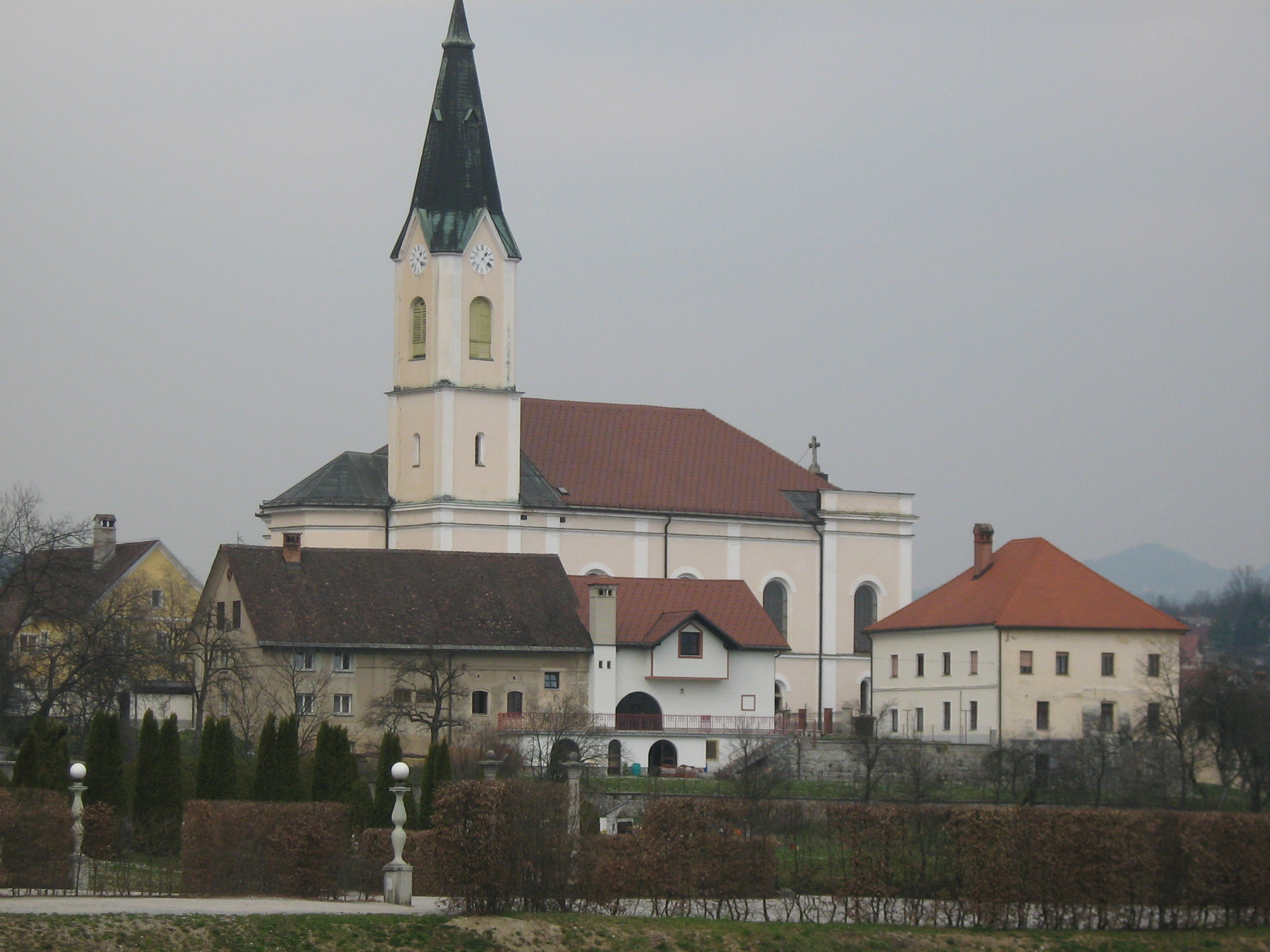 Cerkev svetega Pavla, Vrhnika. Avtor: Yoda